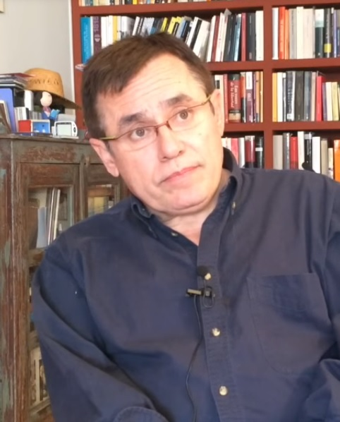 Félix Ovejero